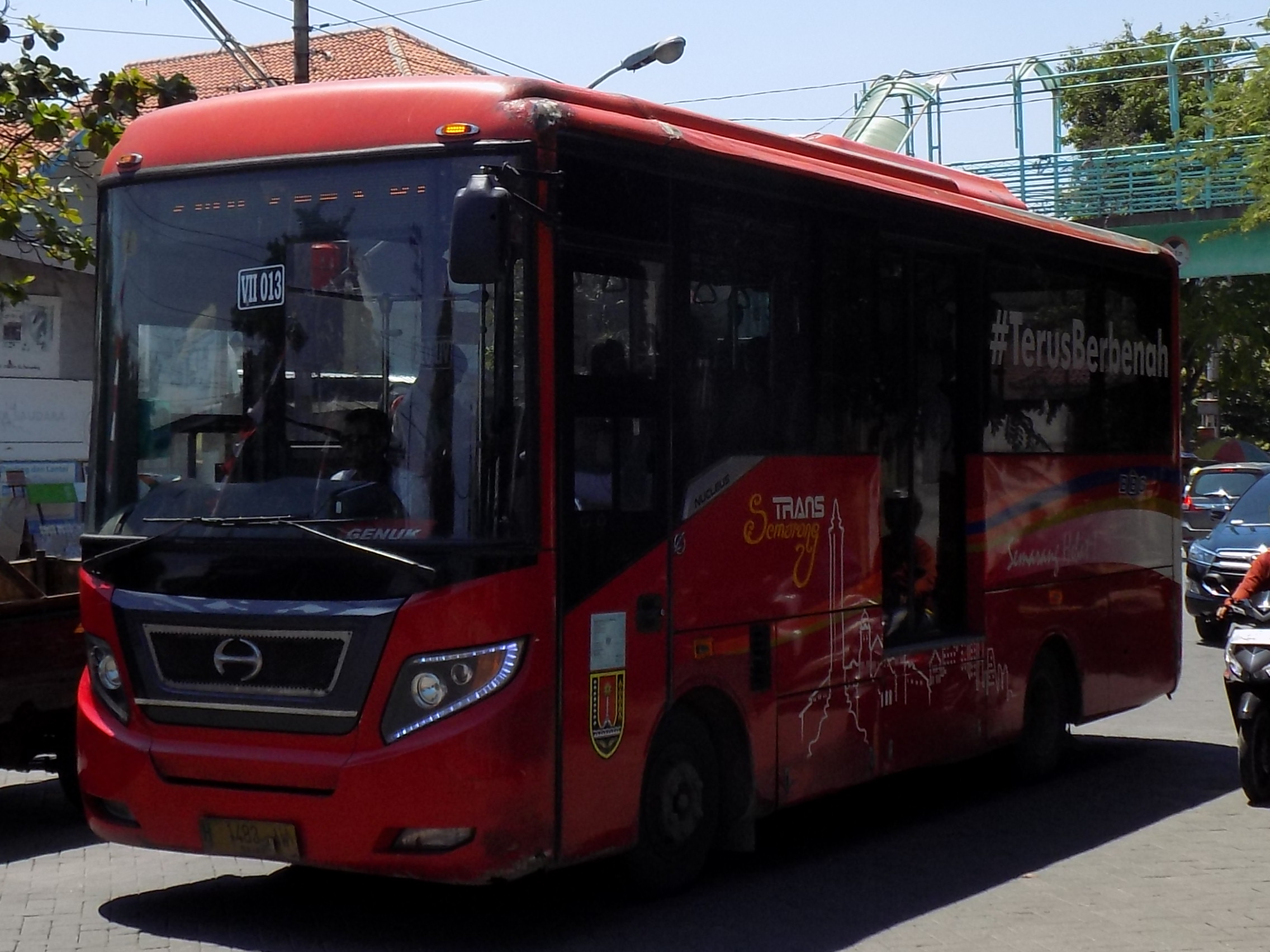 Koridor 7 - Nucleus Trans Semarang Operated by PT Cakra Mega Transport